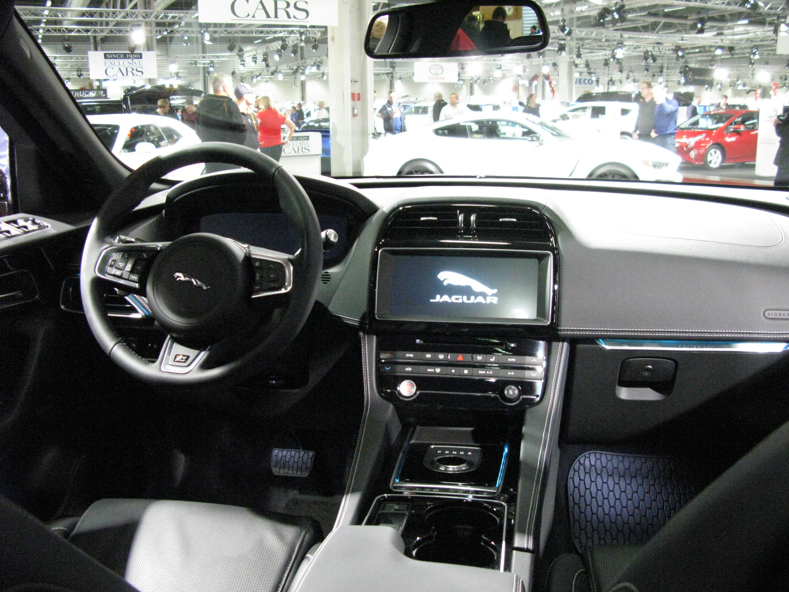 2017 Jaguar F-Pace